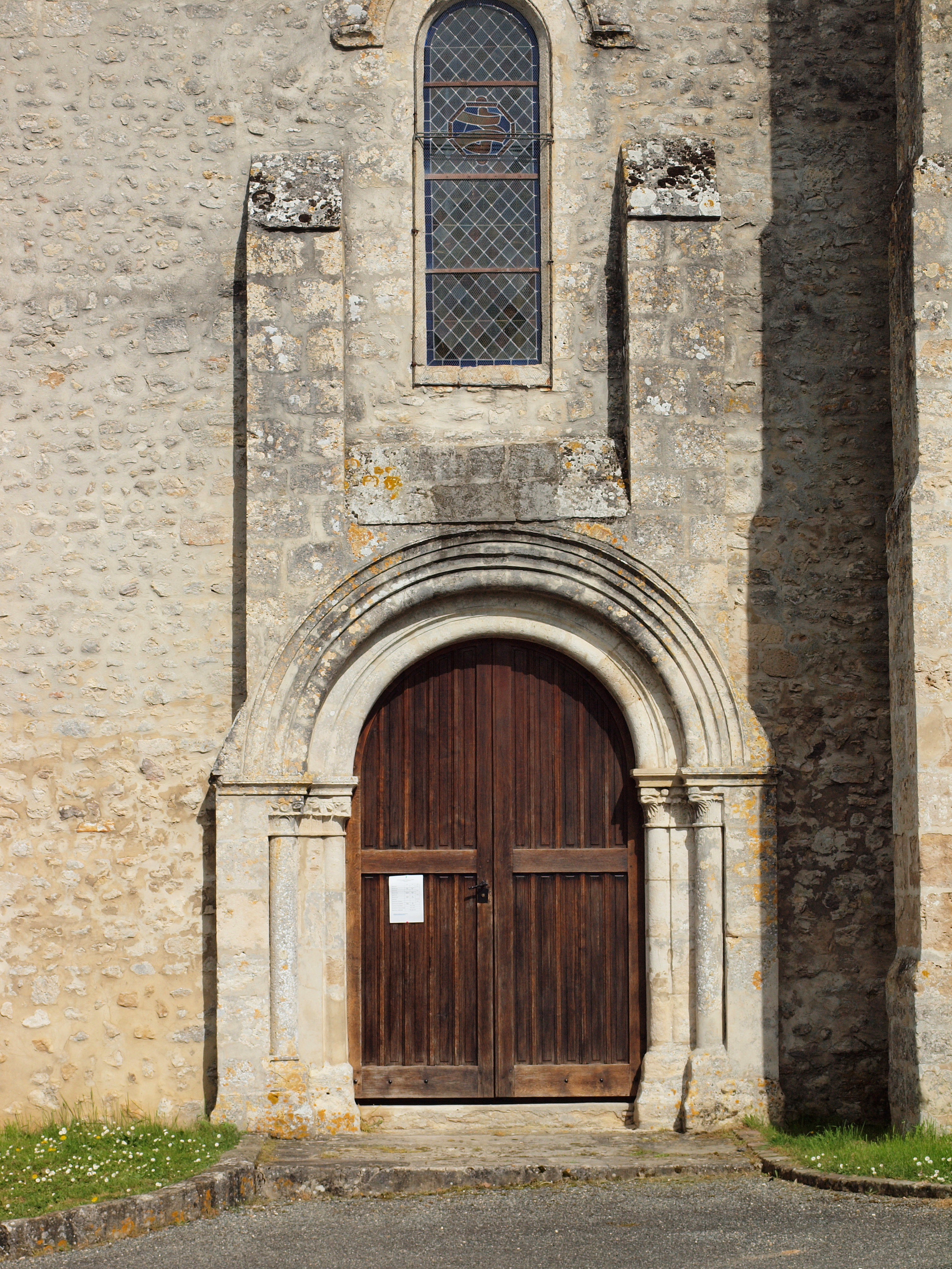 Église Saint-Martin de Valpuiseaux (Essonne, France)